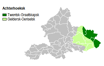 In kaartsje fan it gebiet wêr it Achterhoeksk sprutsen wurdt.Yn it donkergriene part wurdt de fariëteit dy’t in protte wei hat fan it Twentsk sprutsen. It ljochtgriene part is it dialekt mei mear Gelderske ynfloeden.